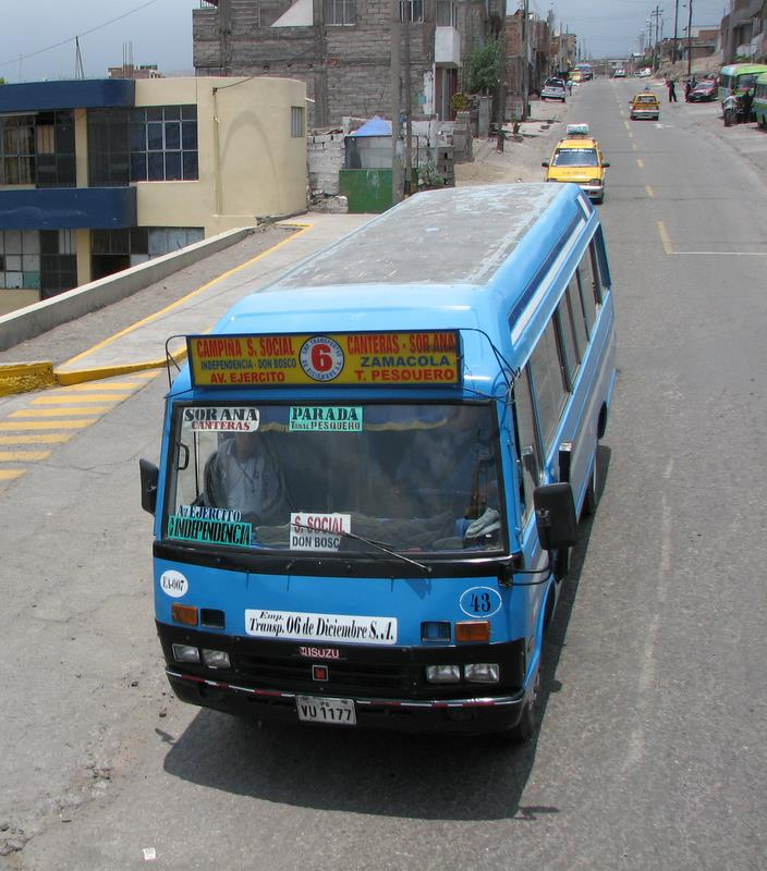 Una combi en una calle arequipeña. Arequipa, Perú.